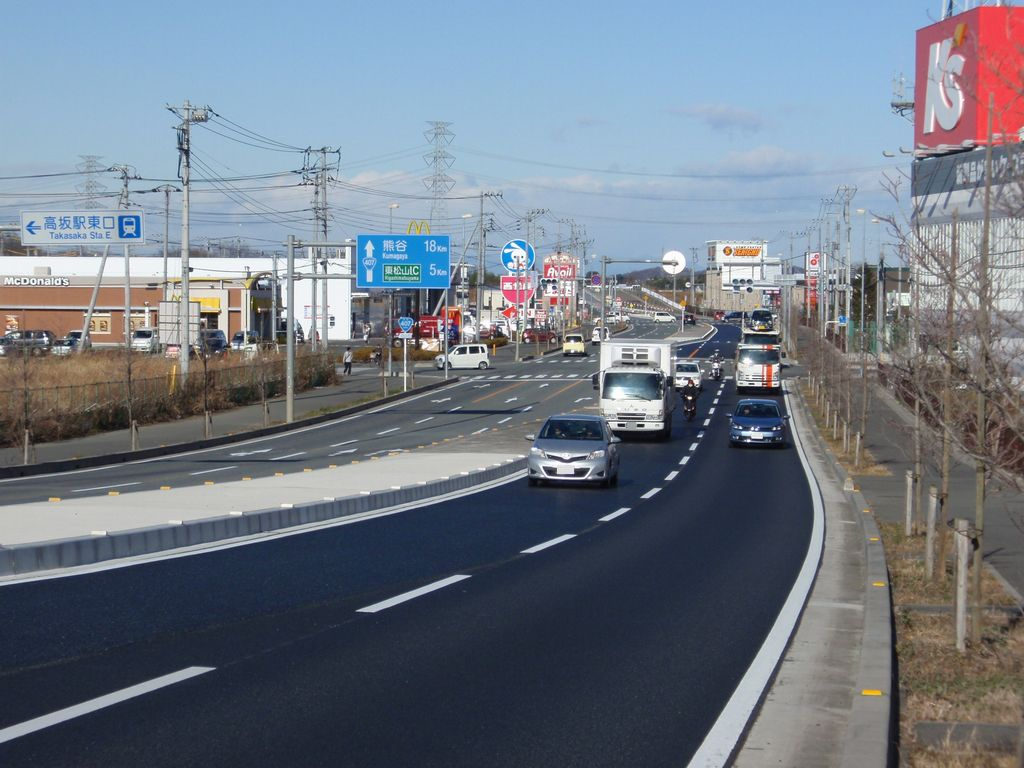 国道407号（東松山バイパス） 埼玉県東松山市あずま町4丁目付近